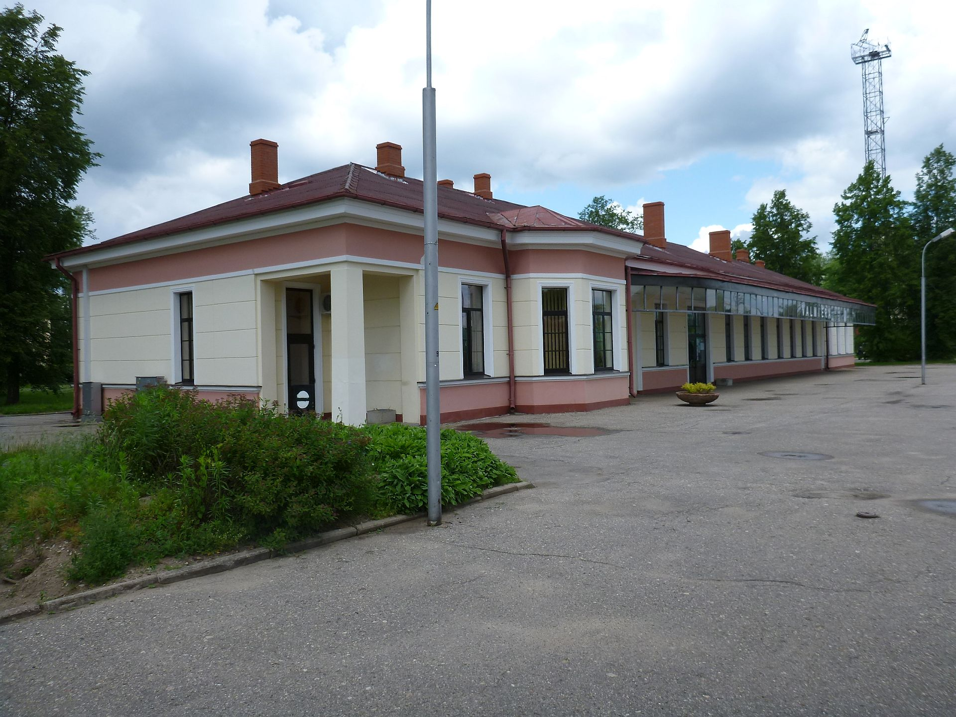 Valmieran rautatieasema